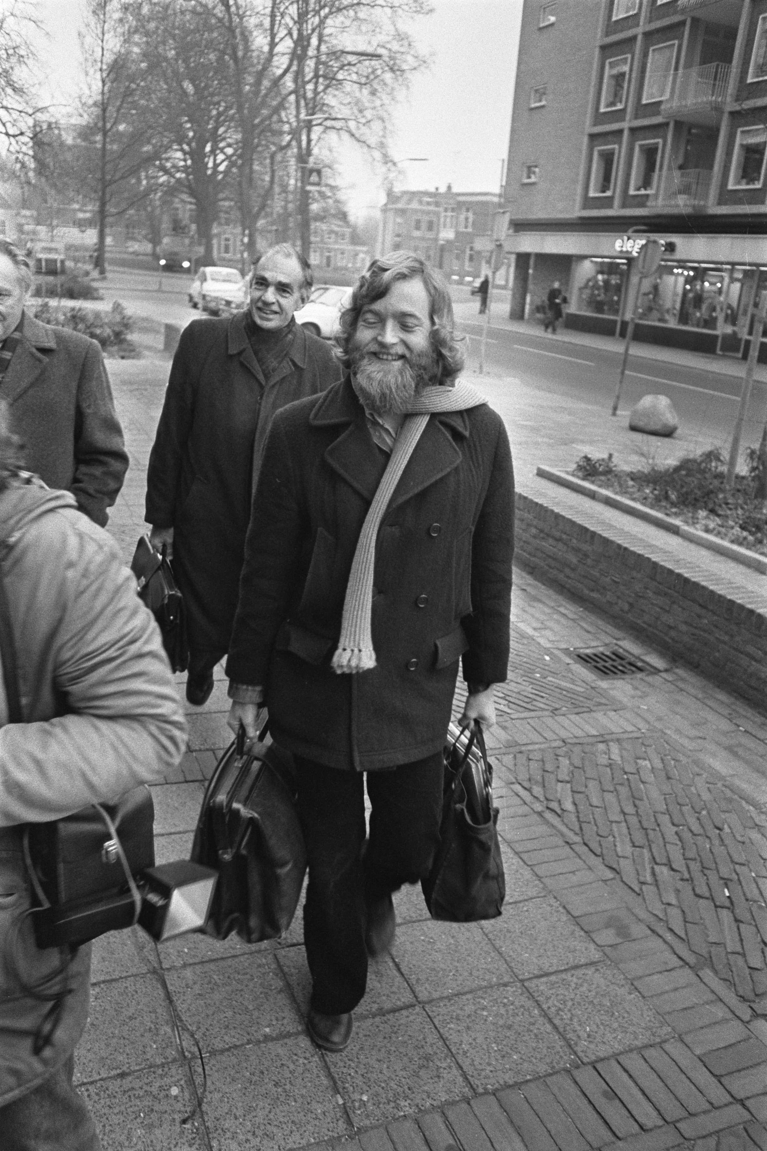 Collectie / Archief : Fotocollectie Anefo Reportage / Serie : [ onbekend ] Beschrijving : ProcesTjerk Vermaning in Assen begonnen; getuigen Dick Stapert (voorop) en links archeoloog dr. Waterbolk Datum : 3 februari 1977 Locatie : Assen Trefwoorden : GETUIGEN, processen Persoonsnaam : Vermaning, Tjerk Fotograaf : Verhoeff, Bert / Anefo Auteursrechthebbende : Nationaal Archief Materiaalsoort : Negatief (zwart/wit) Nummer archiefinventaris : bekijk toegang 2.24.01.05 Bestanddeelnummer : 929-0069